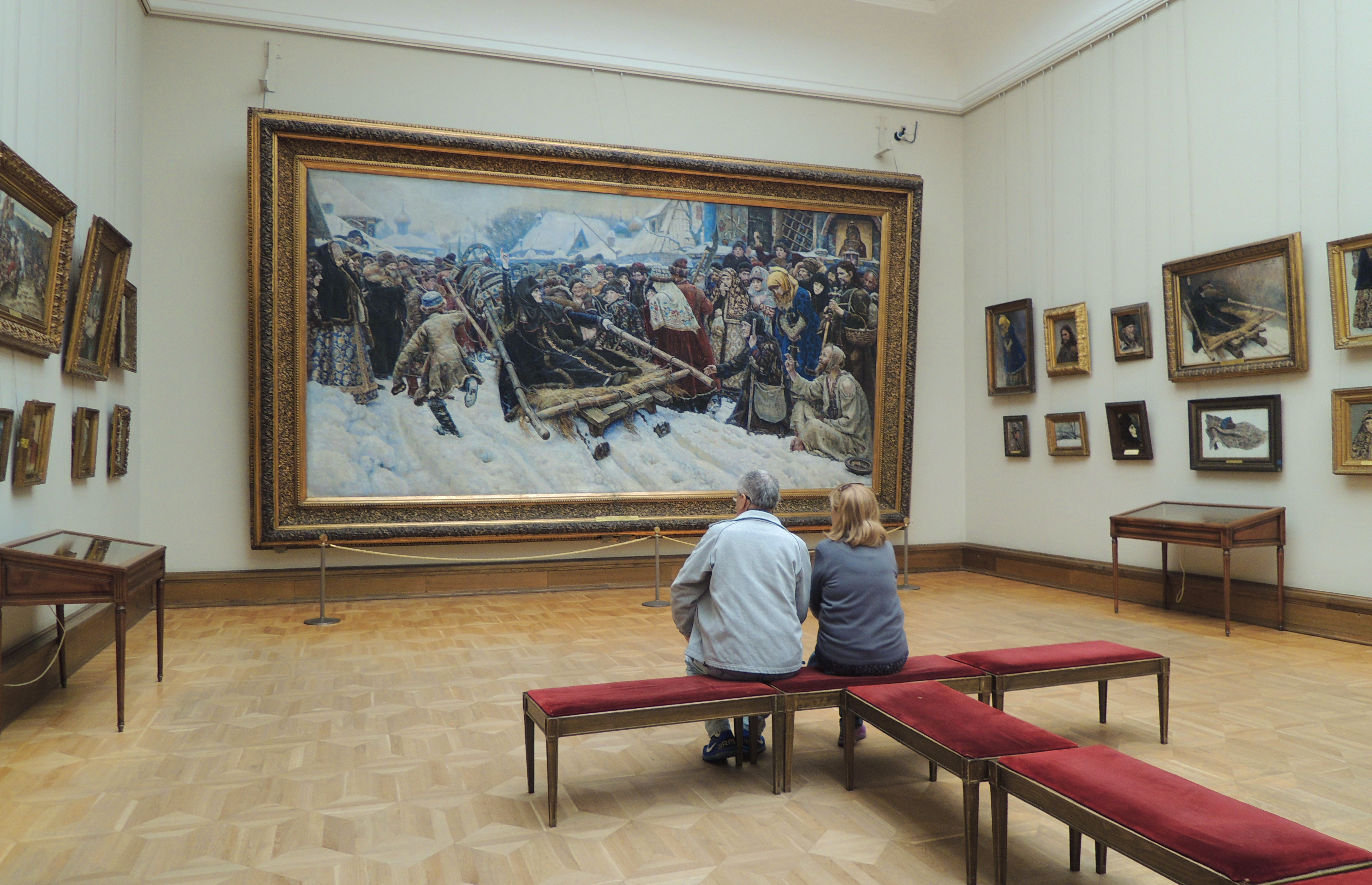 Третьяковская галерея